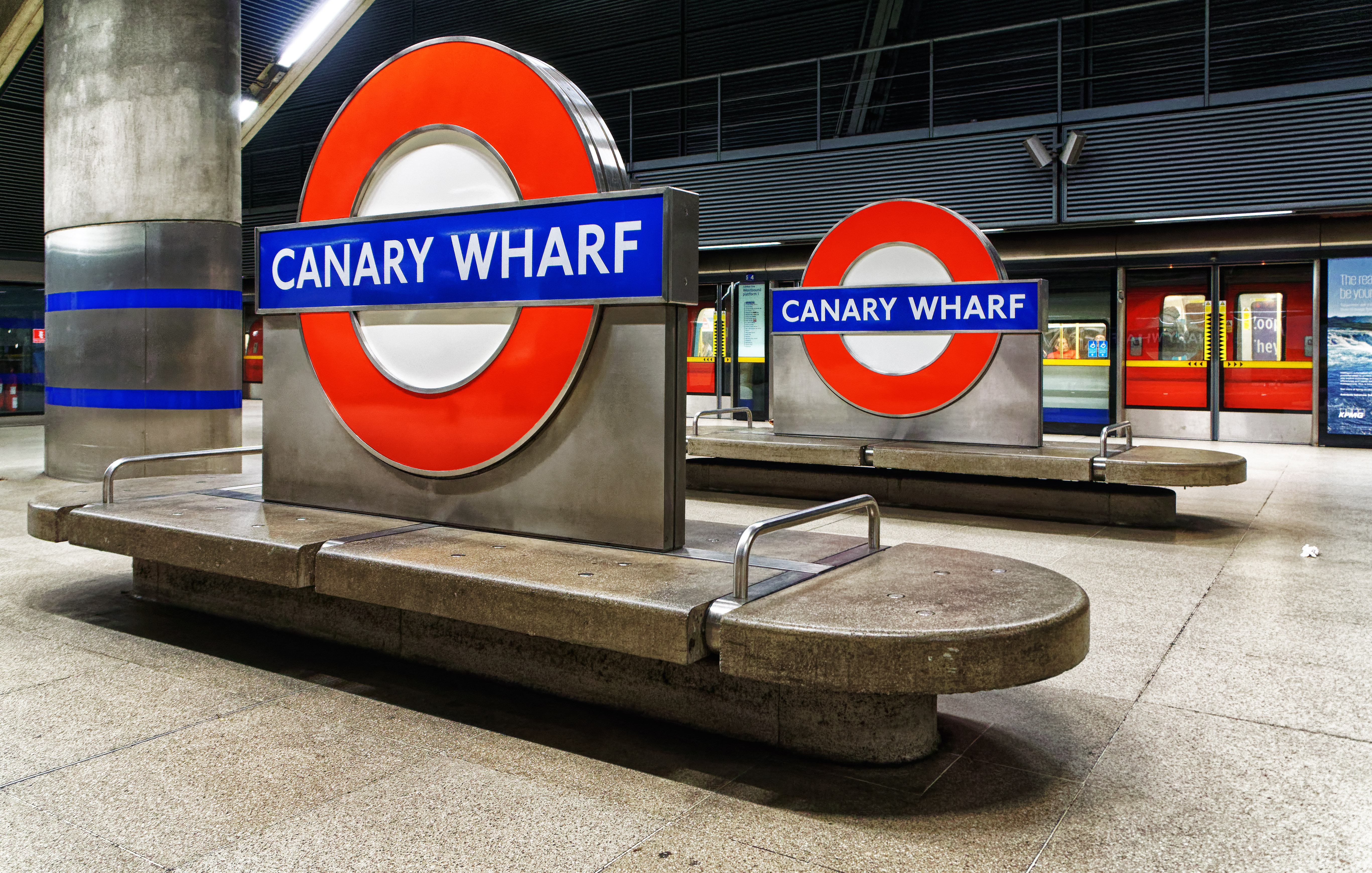 London